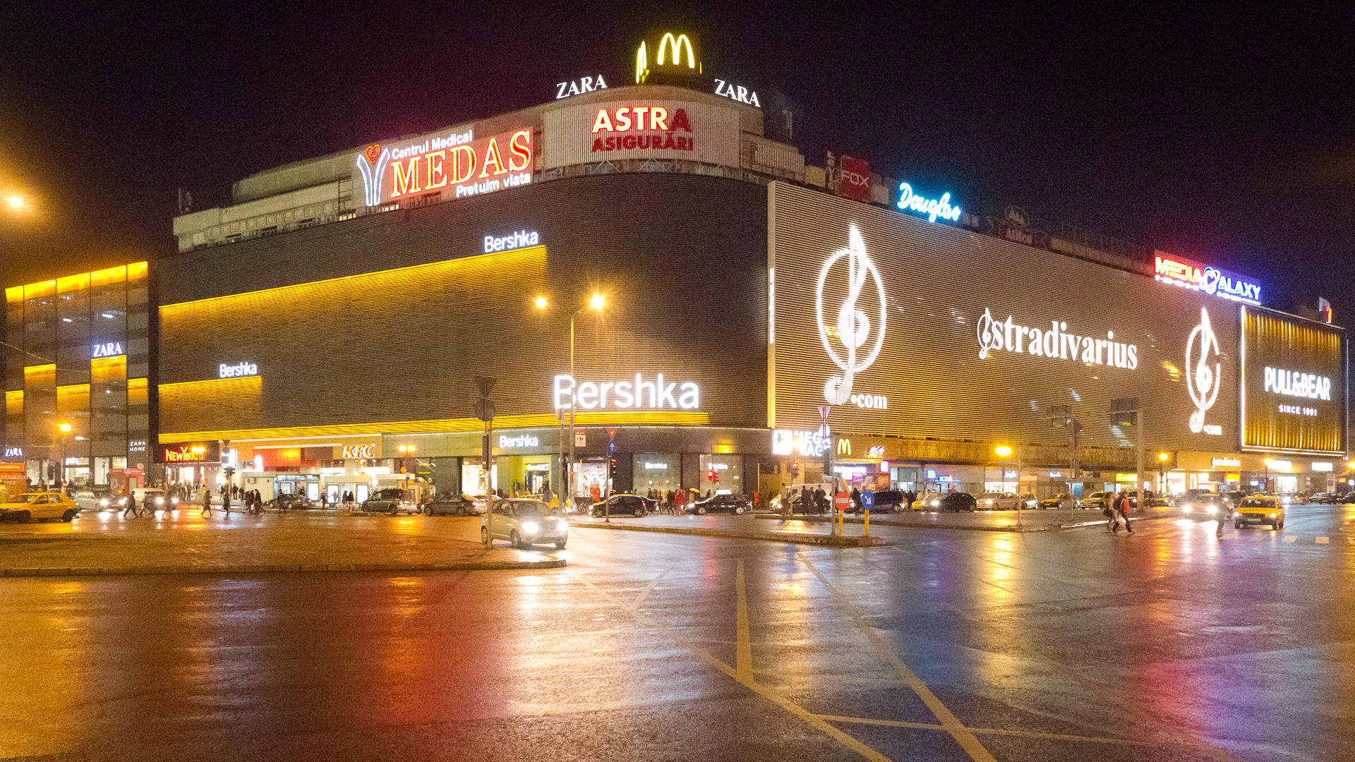 Piata Unirii - Magazinul Unirea - Noaptea